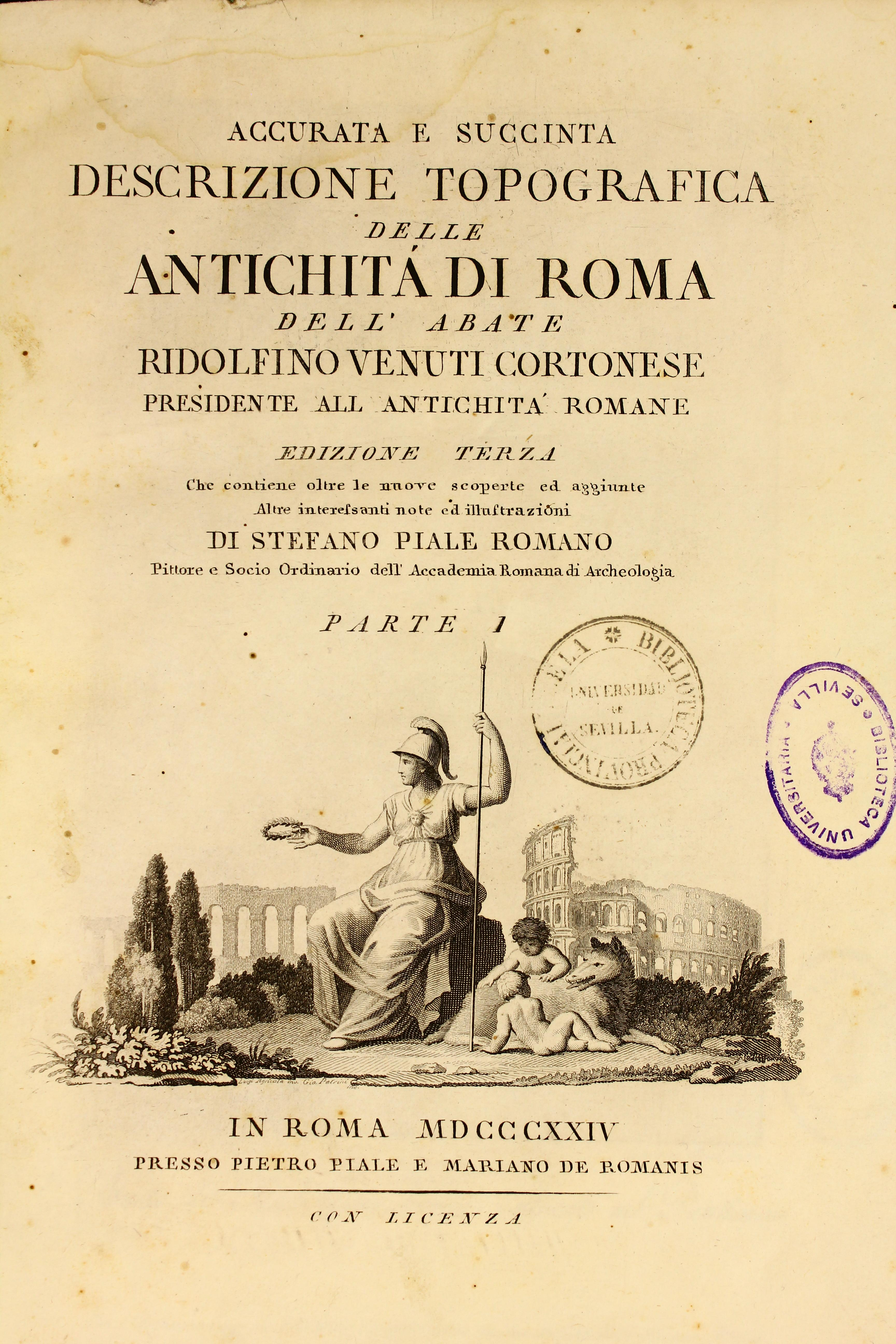 Autor: Venuti, Ridolfino, 1705-1763 Descripción bibliográfica: Accurata e succinta descrizione topografica delle antichita di Roma / Ridolfino Venuti Cortonese. - 3ª ed. - Roma: [s.n.], 1824 (presso Pietro Piale e Mariano de Romanis). - v. ; 26 cm. - T. 1 -- T. 2. - Contiene grab. por todo el texto Materia: Ciudades antiguas Materia: Roma - Descripciones Materia: Roma - Historia Localización: Libro completo